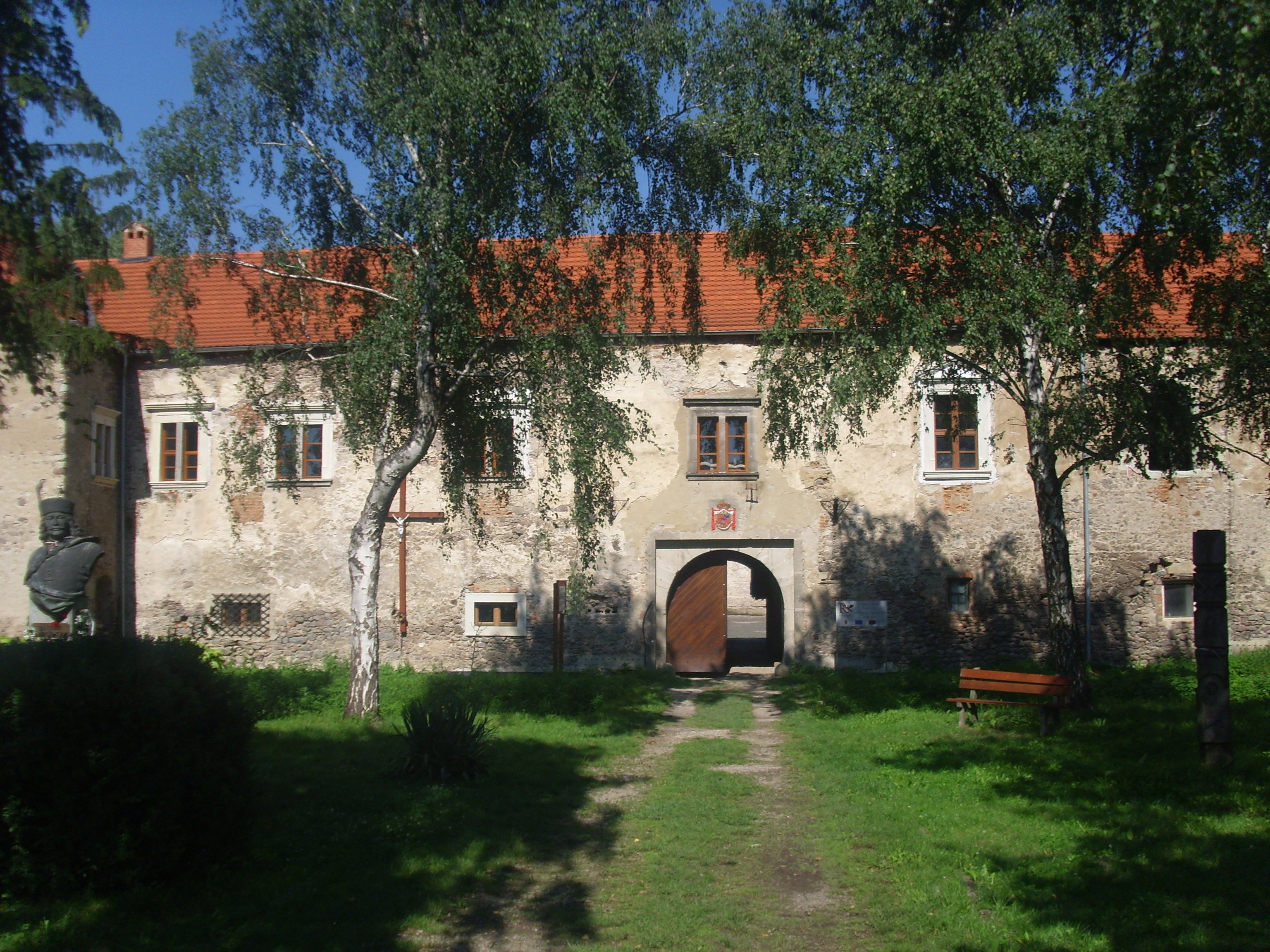 Rákóczi kastély Borsiban, előtte II. Rákóczi Ferenc mellszobra, Szlovákia